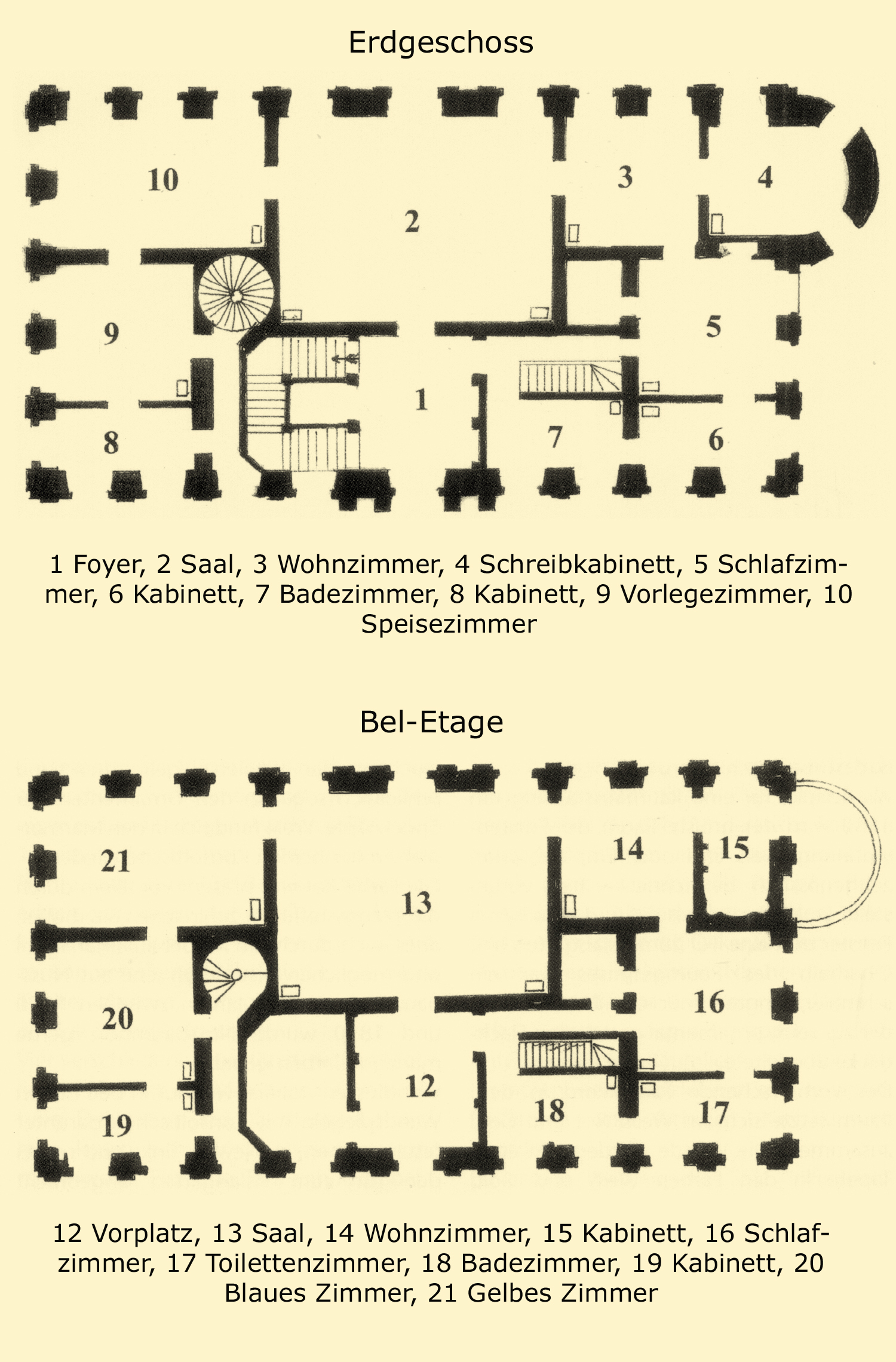 Neues Palais, Detmold. Grundriss vom Zustand aus 1855.